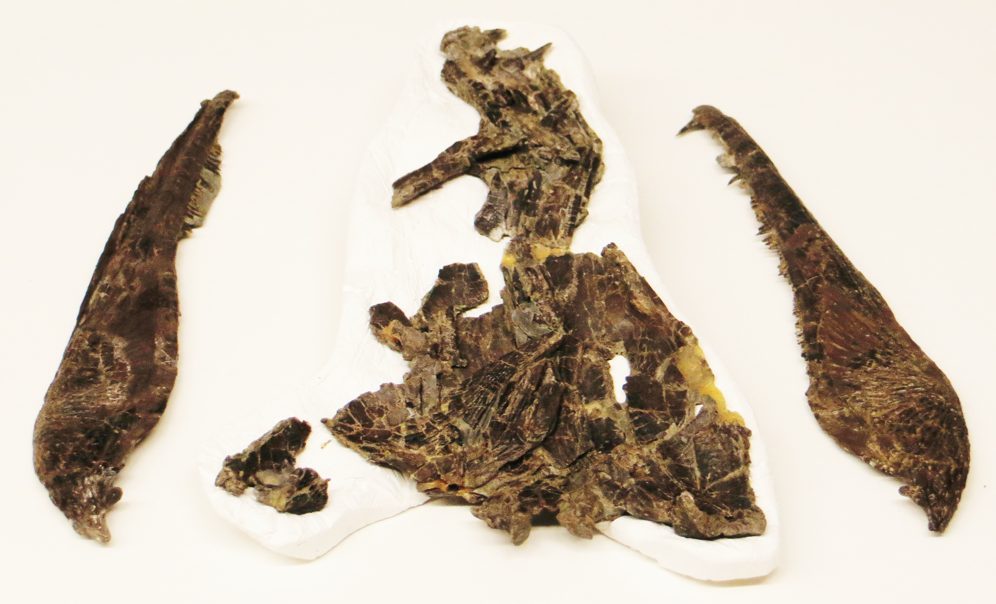 Took the picture at Muschelkalkmuseum Ingelfingen